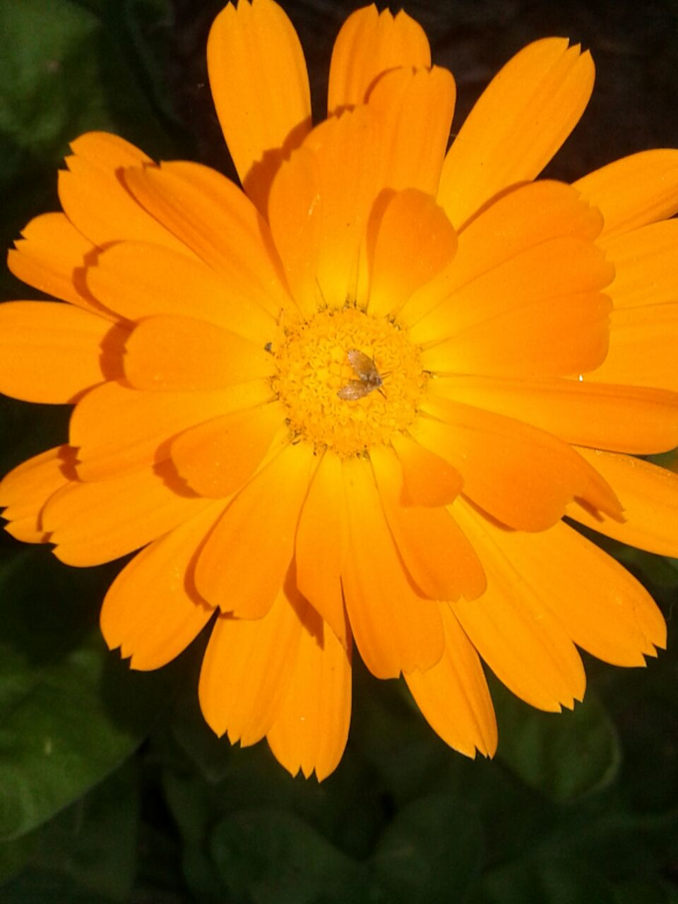 Flor de calendula de nuestra huerta orgánica educativa que colabora con incorporacion de insectos beneficiosos para nuestra huerta.